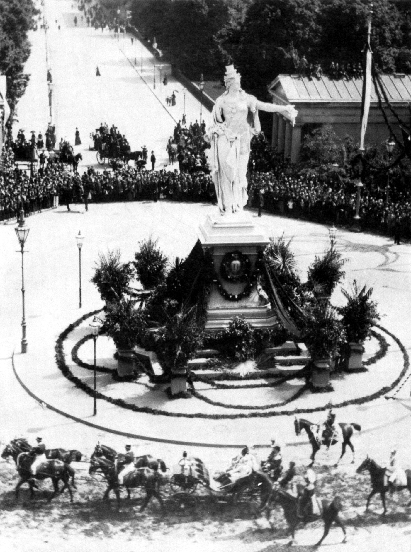 Berolina